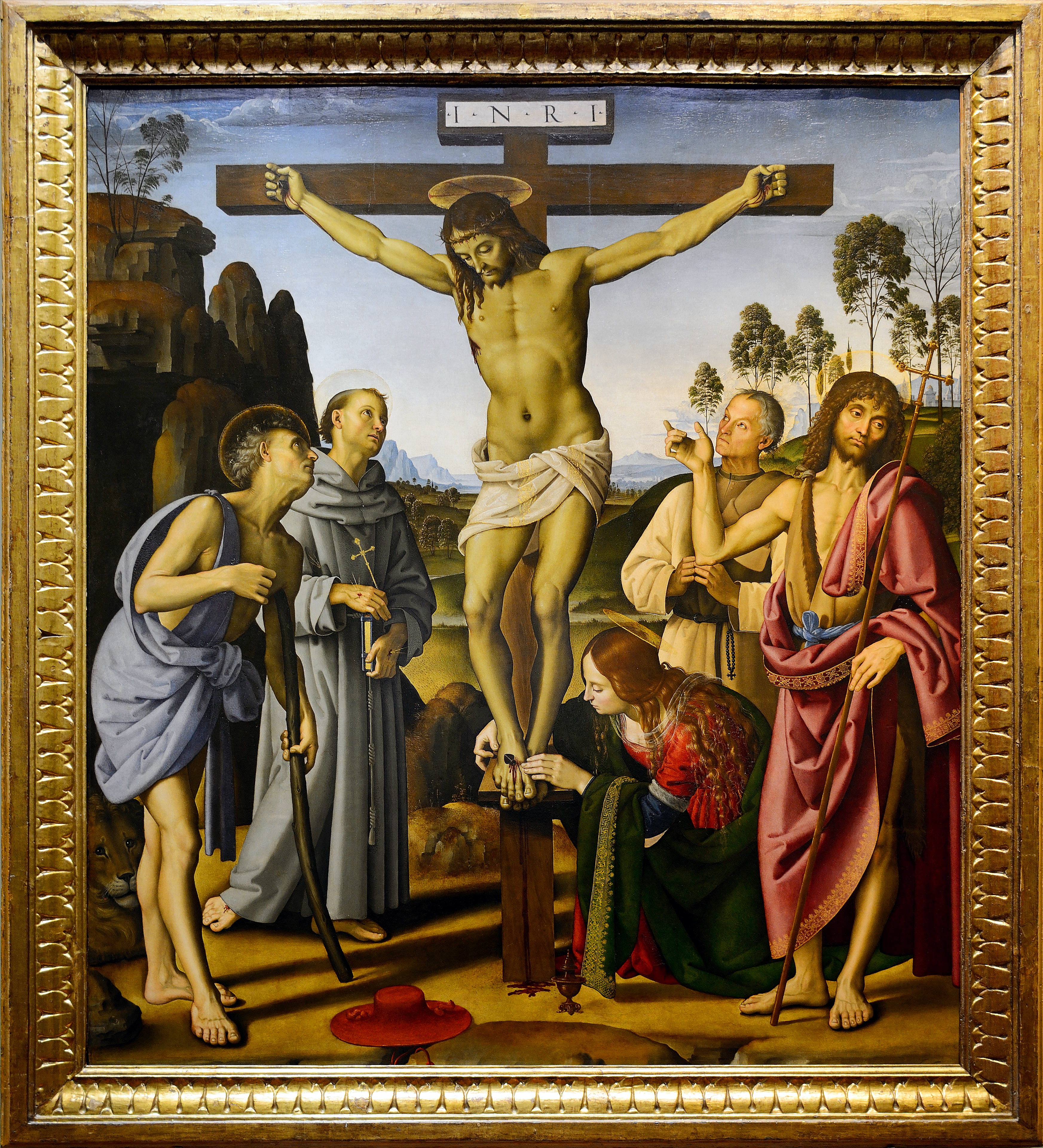 Crocifissione con i Santi Girolamo, Francesco, Maria Maddalena, Giovanni Battista e il beato Giovanni Colombini.